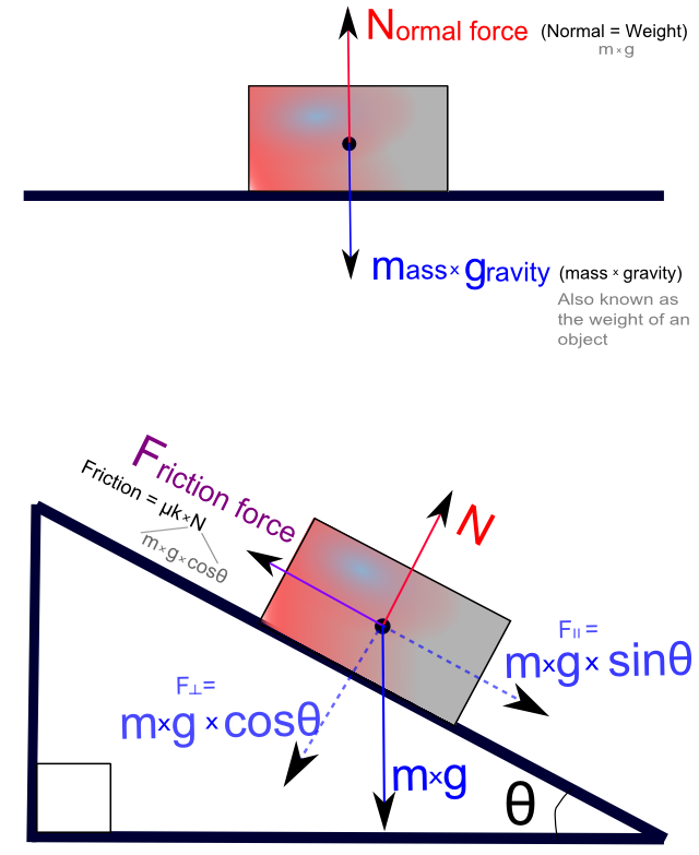 beta